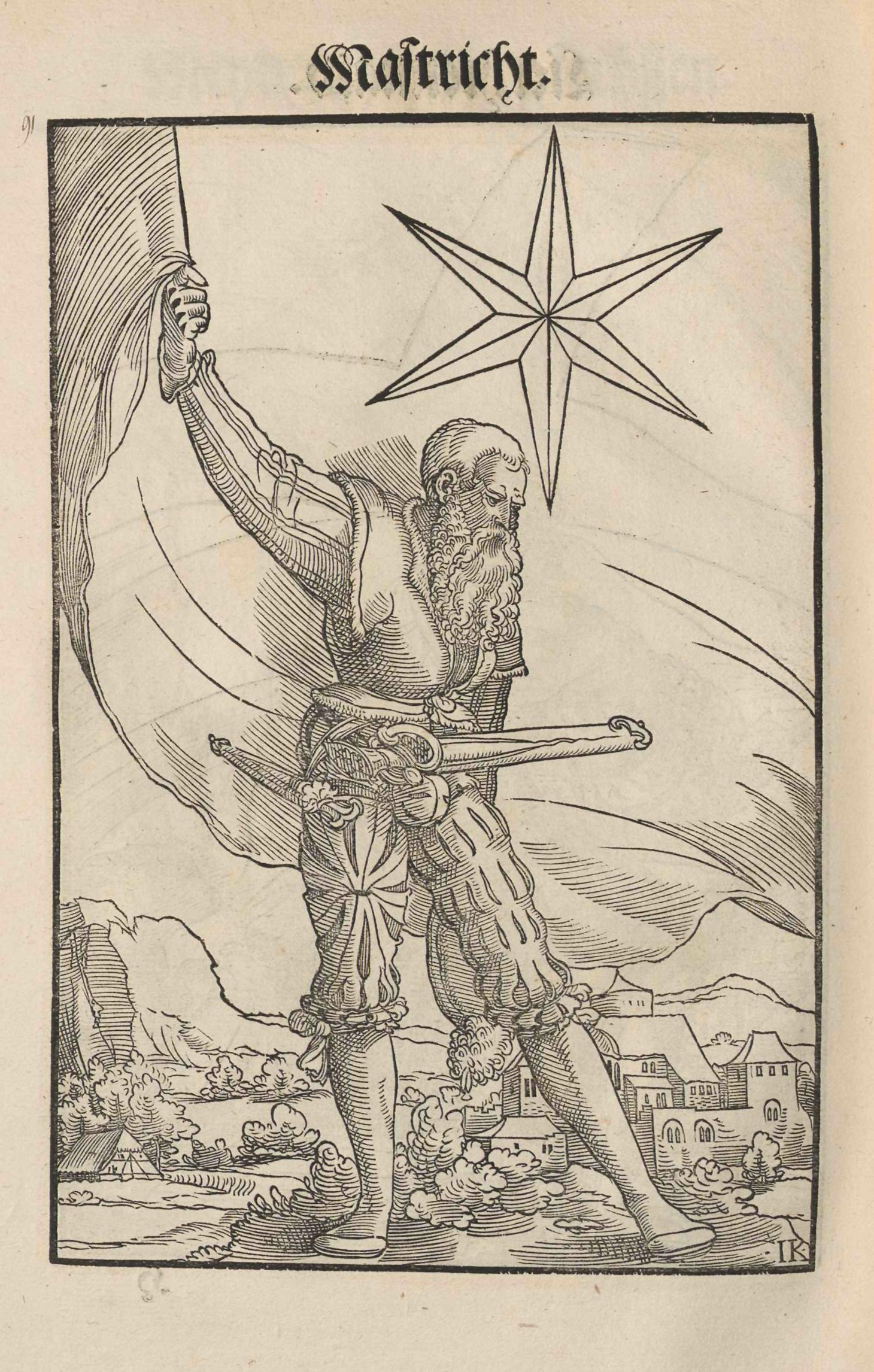 Jacob Koebel (Vorrede): Wapen. Des Heyligen Römischen Reichs Teutscher nation. Gedruckt bei Cyriacus Jacob (evtl. auch Herausgeber/Autor), Frankfurt am Main 1545, Holzschnitte von Jacob Kallenberg. Zu Angaben zur Tingierung (Farbgebung) der Wappen siehe das Register ab Bild Nr. 165. Mastricht (Maastricht)